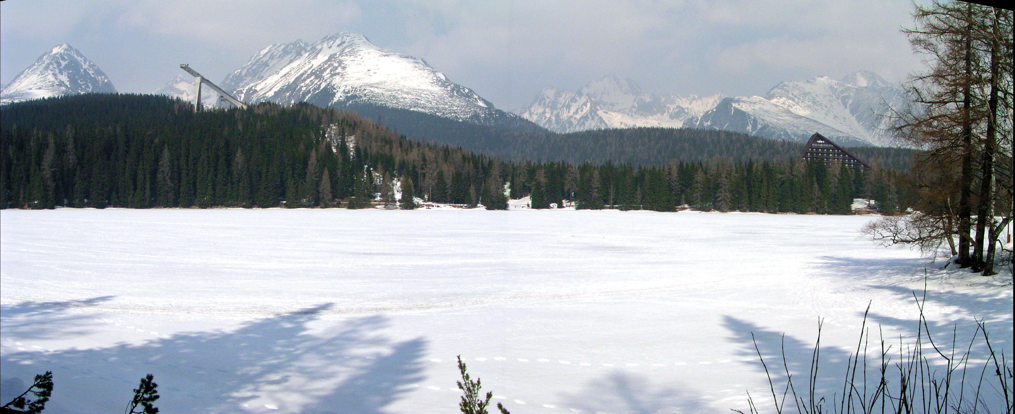 Strbske Pleso in winter